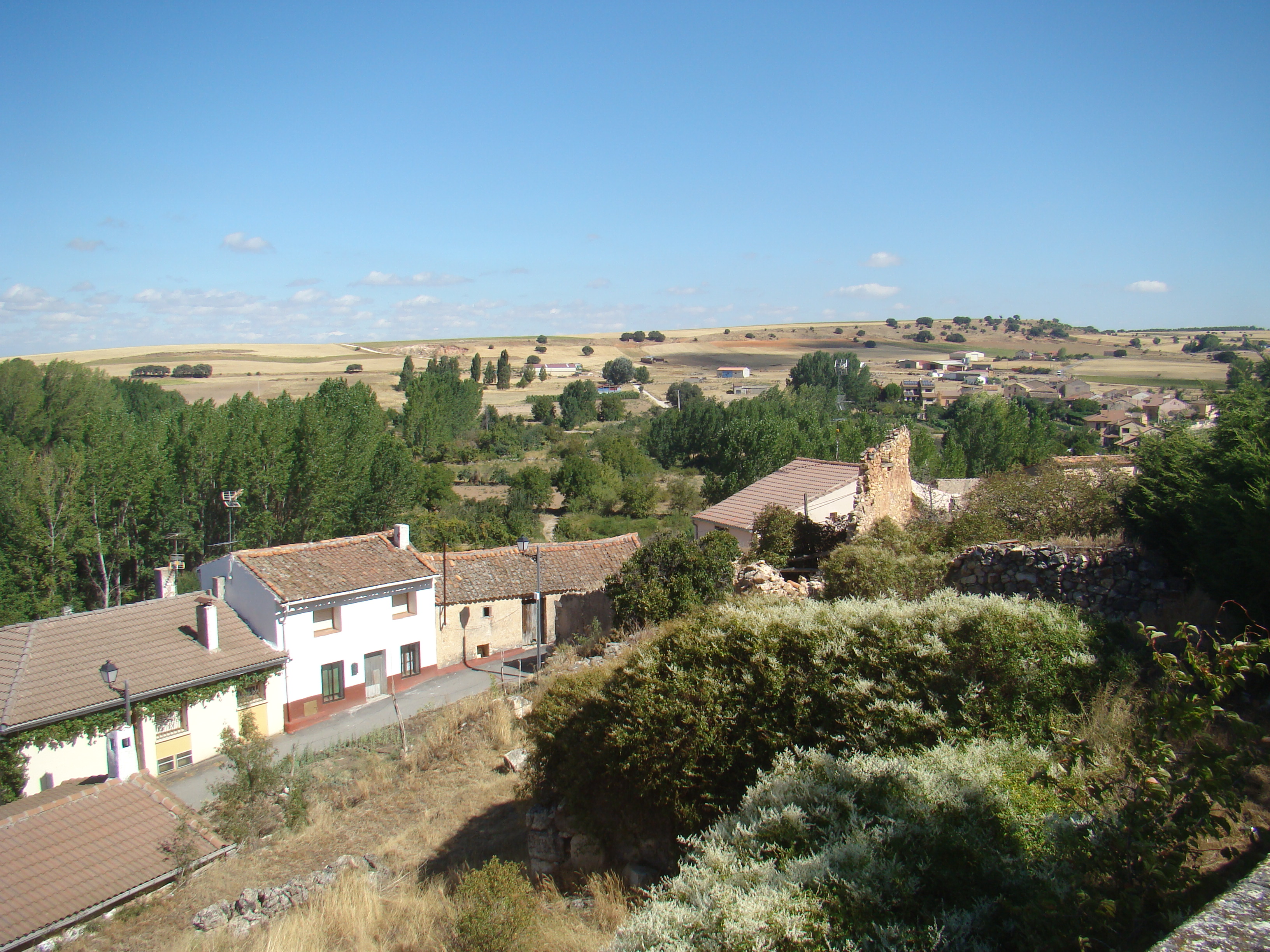 Caballar, Segovia (España). Urbanismo y arquitectura popular.